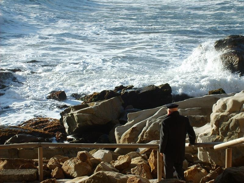 Gonzalo Rojas en su última visita a Lebu en 2010